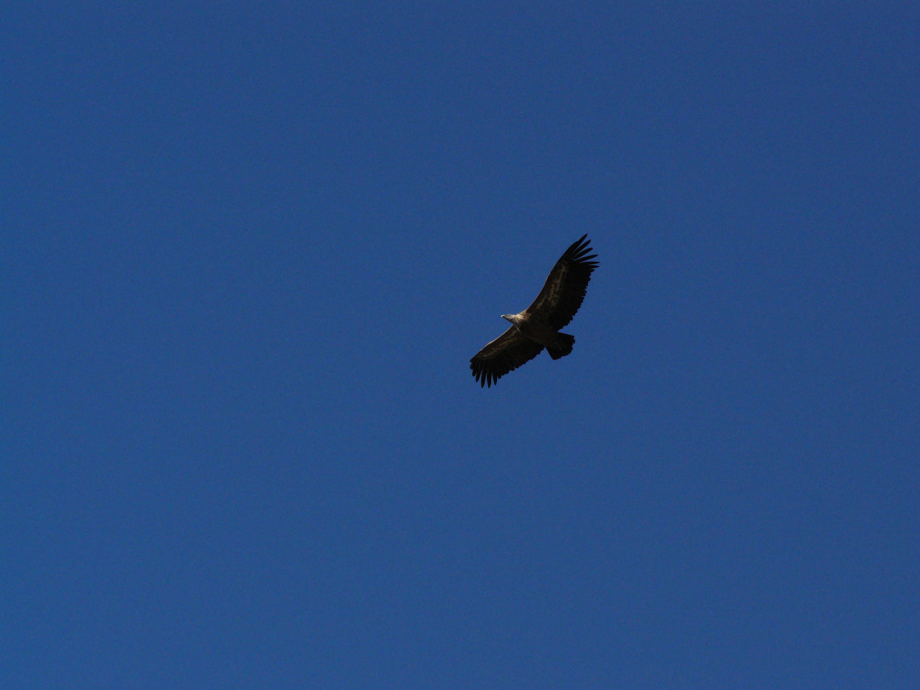 Buitres en la Reserva de Montejo de la Vega de la Serrezuela (Segovia), junto al río Riaza